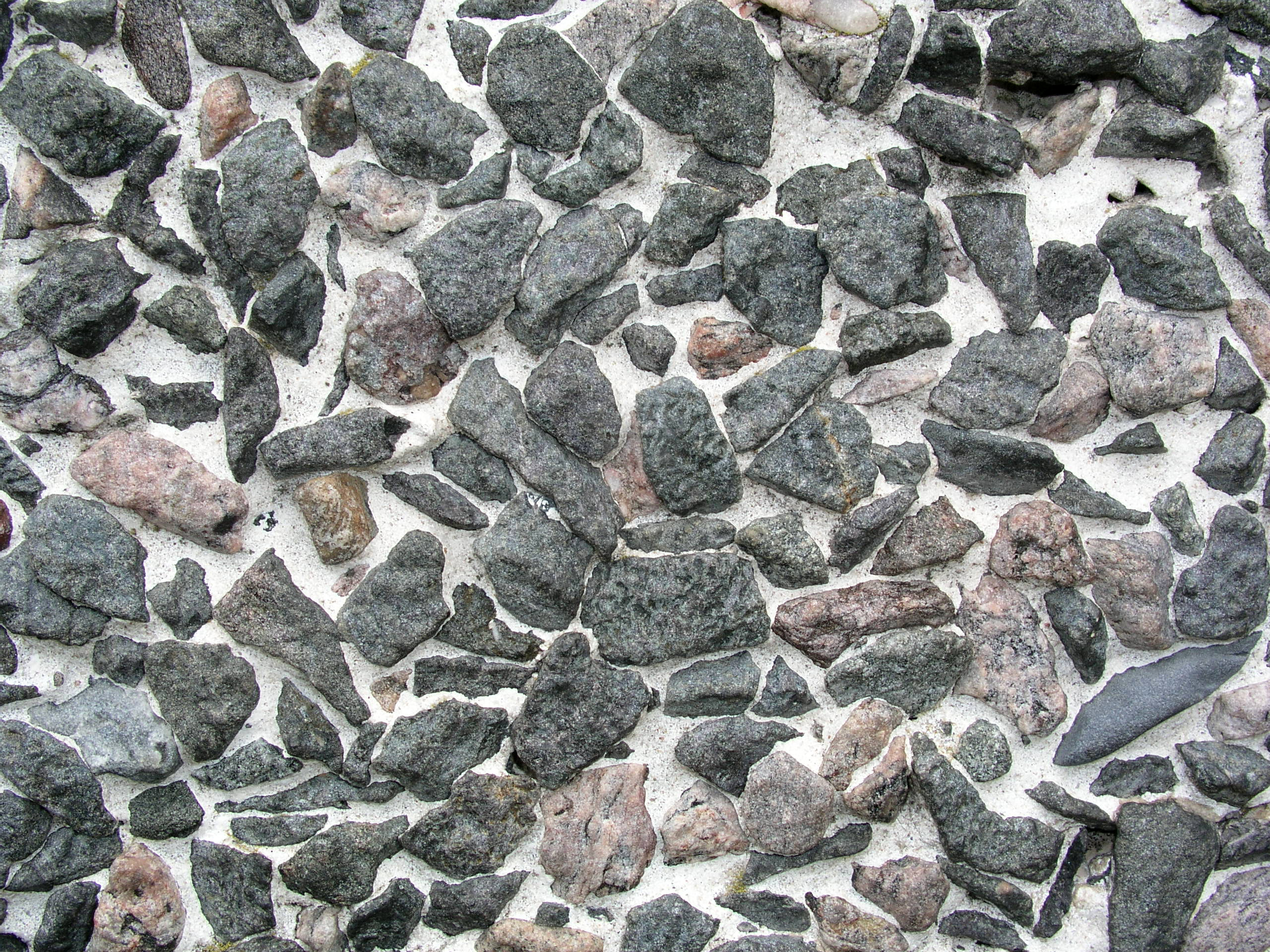 Picasso-statyn på Strandudden, Kristinehamn, Sweden. Den blästrade ytan på Picasso-statyn.